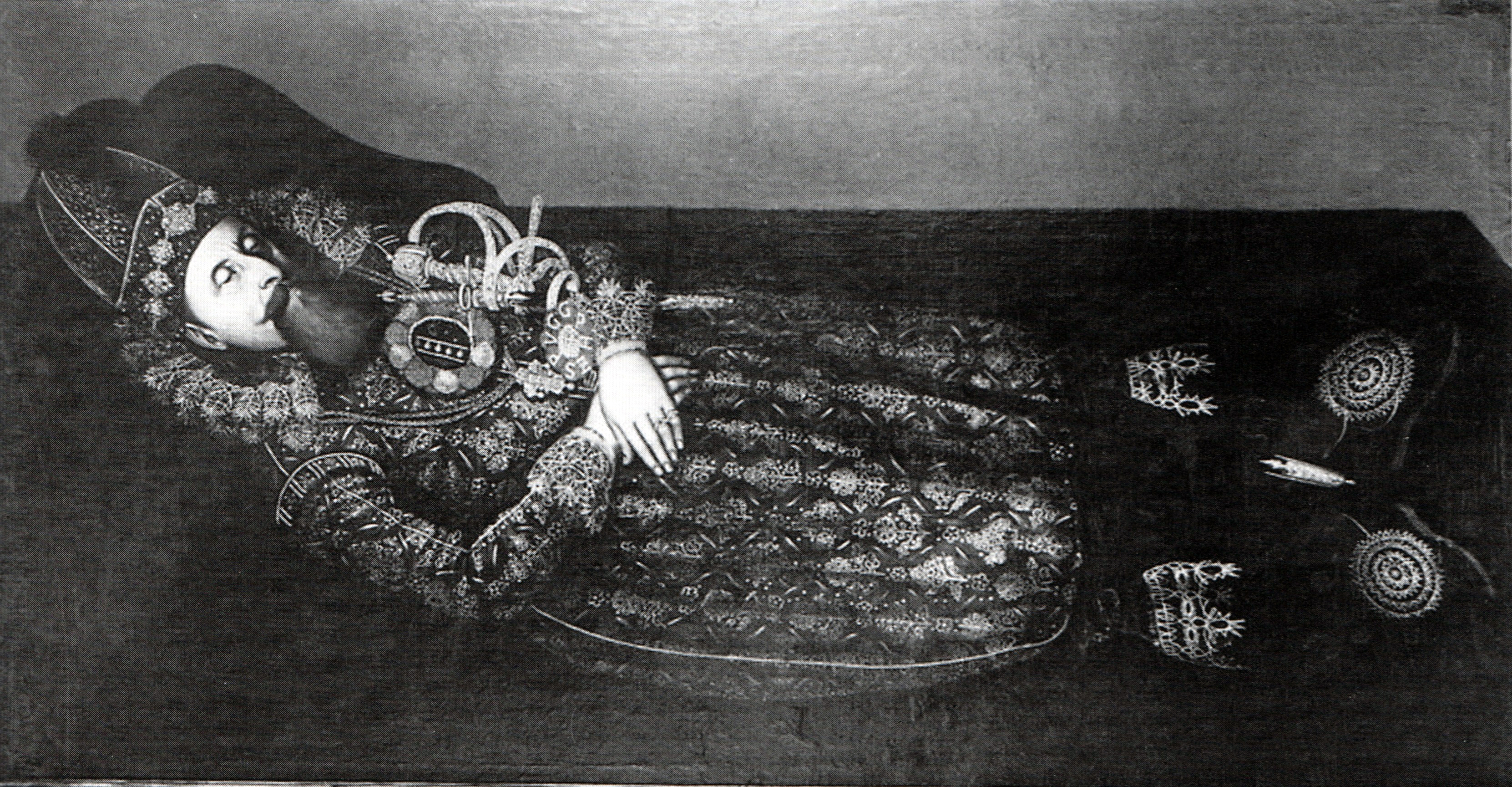 Ölgemälde von Herzog Philipp II. von Pommern-Stettin auf dem Totenbett. Bis 1945 in der Schlosskirche Stettin, wahrscheinlich Kriegsverlust.